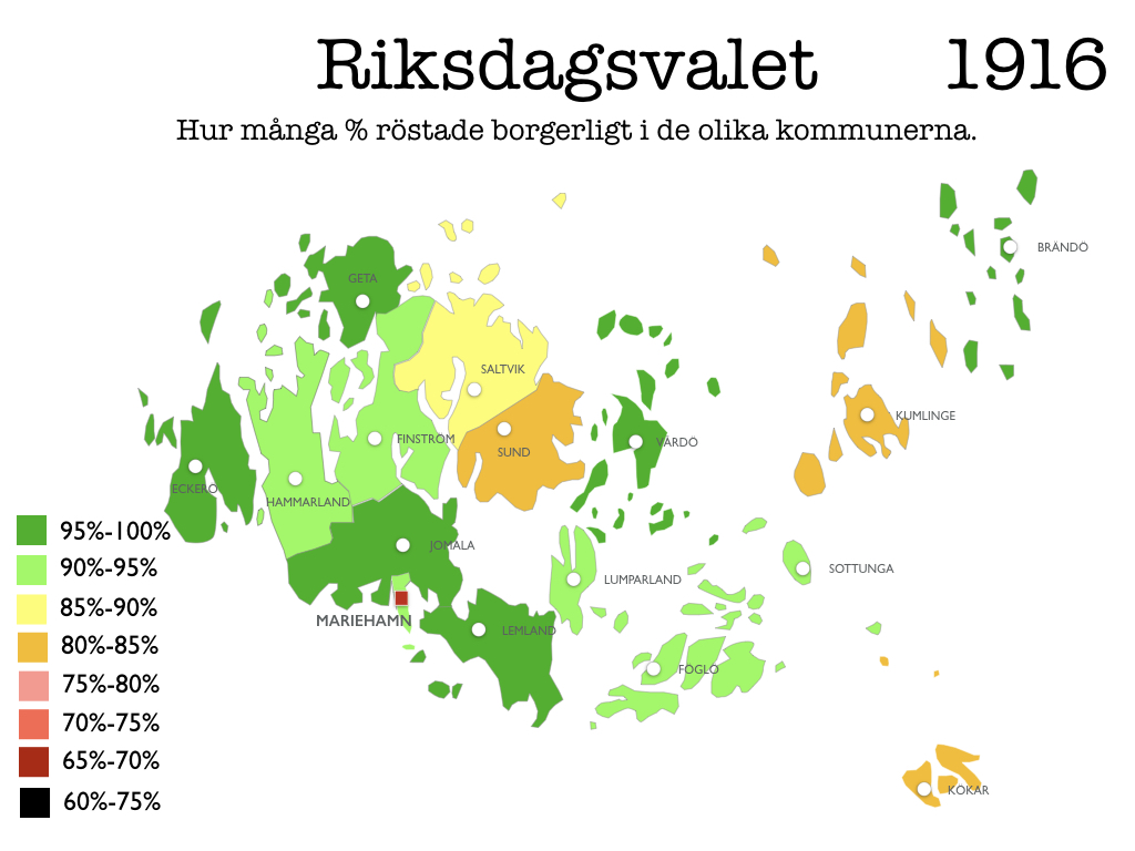 Riksdagsvalet 1916 på Åland. Kartan visar i vilken hög grad borgerligt de olika kommunerna röstade i valet